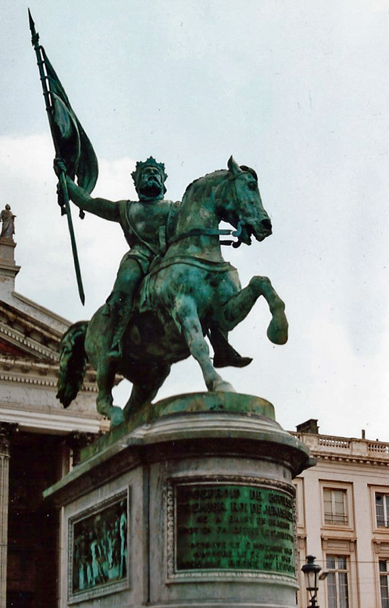 Standbeeld van Godfried van Bouillon in Brussel